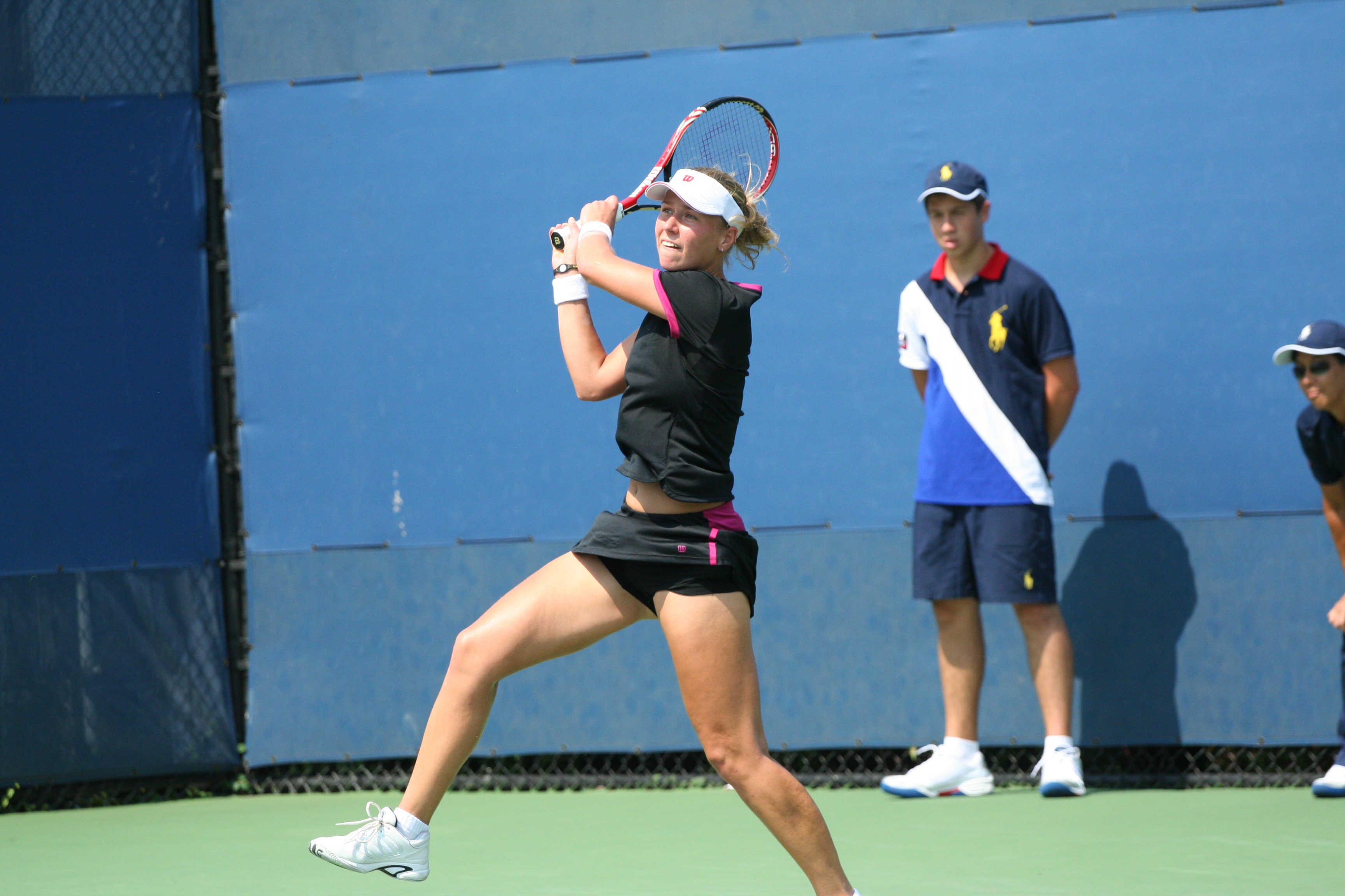 U.S. Open Sept. 1, 2010